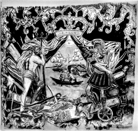 Ротное знамя лейб-гвардии Преображенского полка в 1700 году. В центре полотнища — занавес, раздвинутый Марсом и Нептуном, вид моря с лодкой, в которой Сатурн обучает юношу управлять веслом. На заднем плане — горящий город и строящиеся корабли. Над этой композицией изображен выходящий из облаков меч, под ней — белая лента с надписью «Anno Domini. 1700». Растительный орнамент. [1]